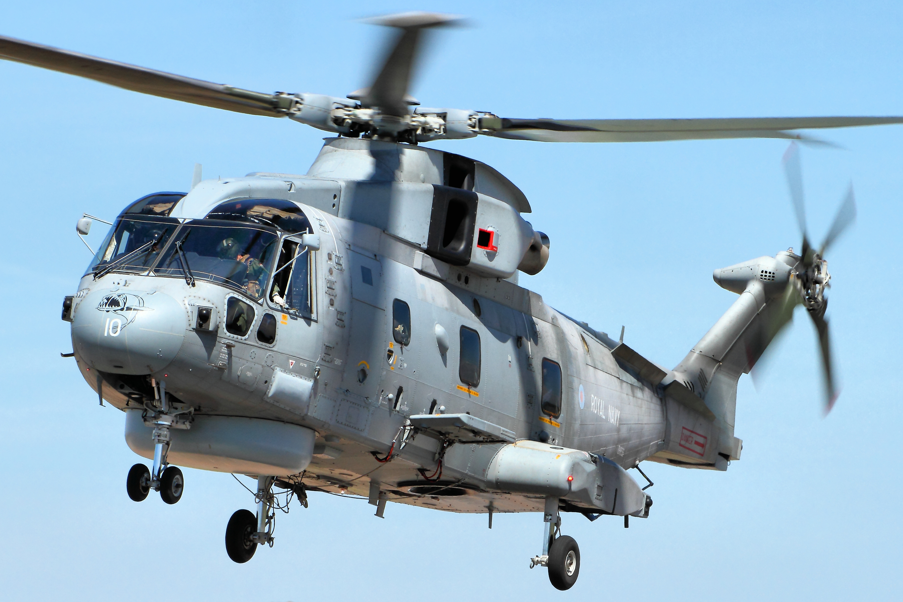 Merlin HM2 - RIAT 2014